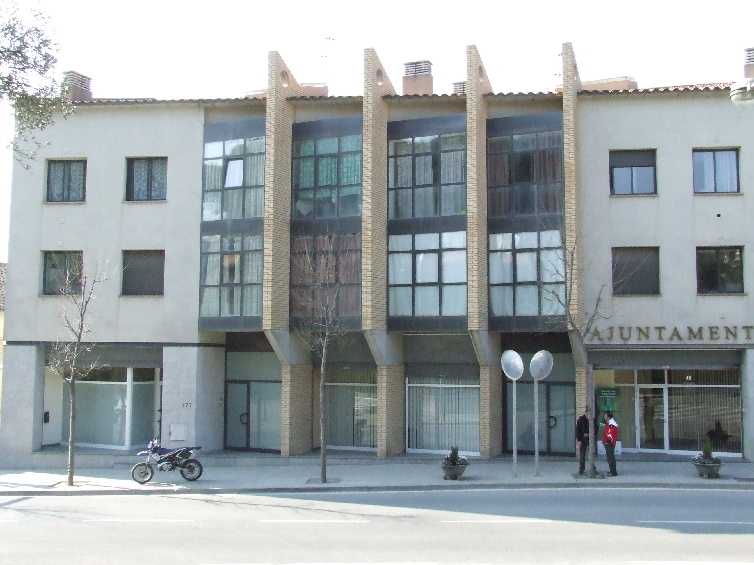 La moderna Casa de la Vila de Bigues i Riells (Vallès Oriental).